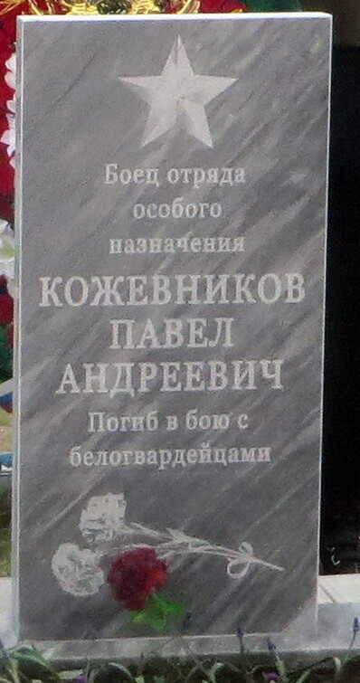 Памятник Кожевникову П.А. в селе Лобаново Курганской области